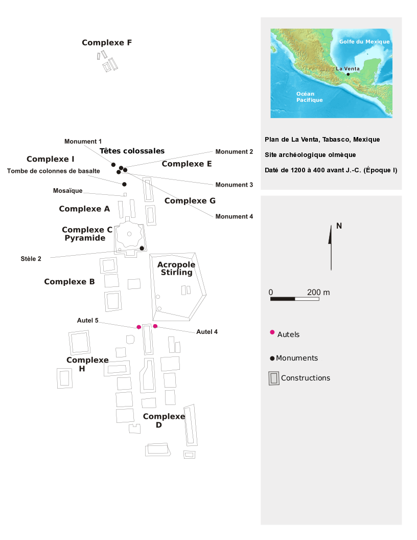 French map of La Venta, Tabasco, Mexico